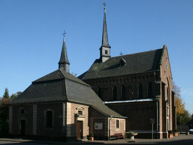 Marienkapelle in Wegberg-Holtum